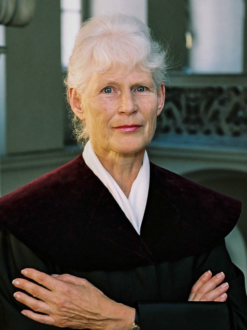 Dr. Lisbeth Lass ist eine österreichische Juristin und ehemalige Verfassungsrichterin. Hier auf einem Bild aus dem Jahr 2003.